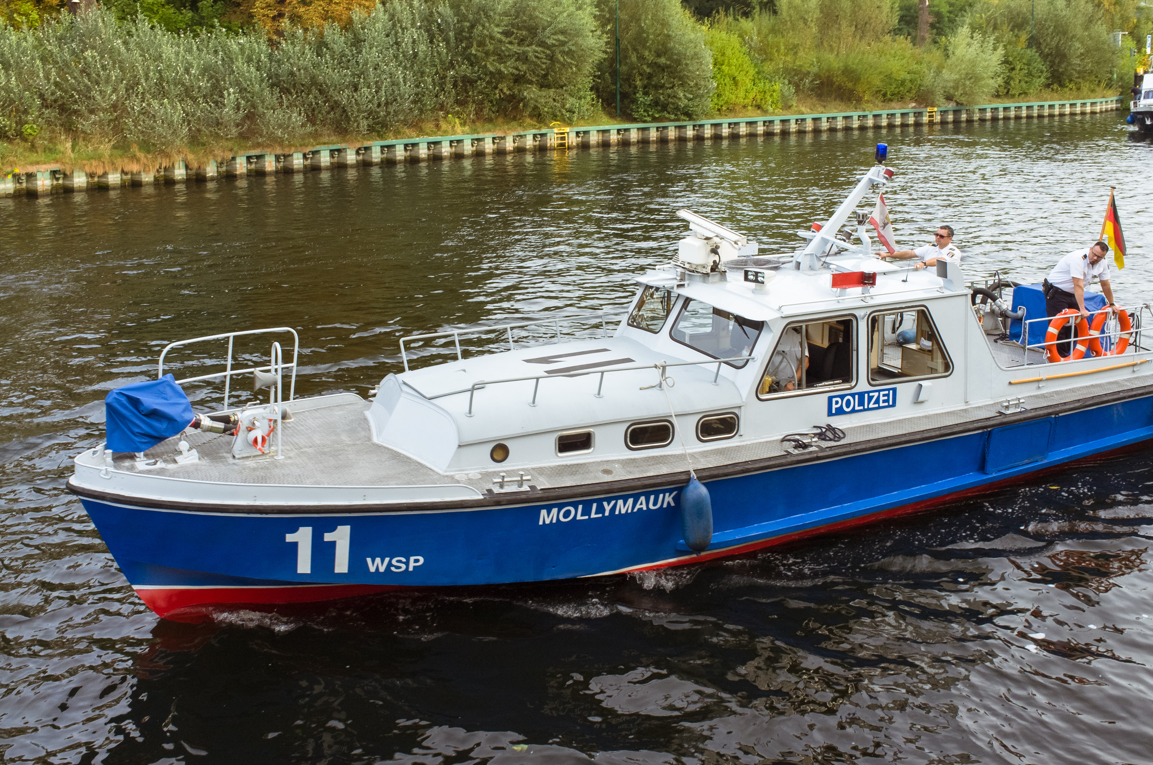 Boot WSP 11 Mollymauk der Wasserschutzpolizei Berlin